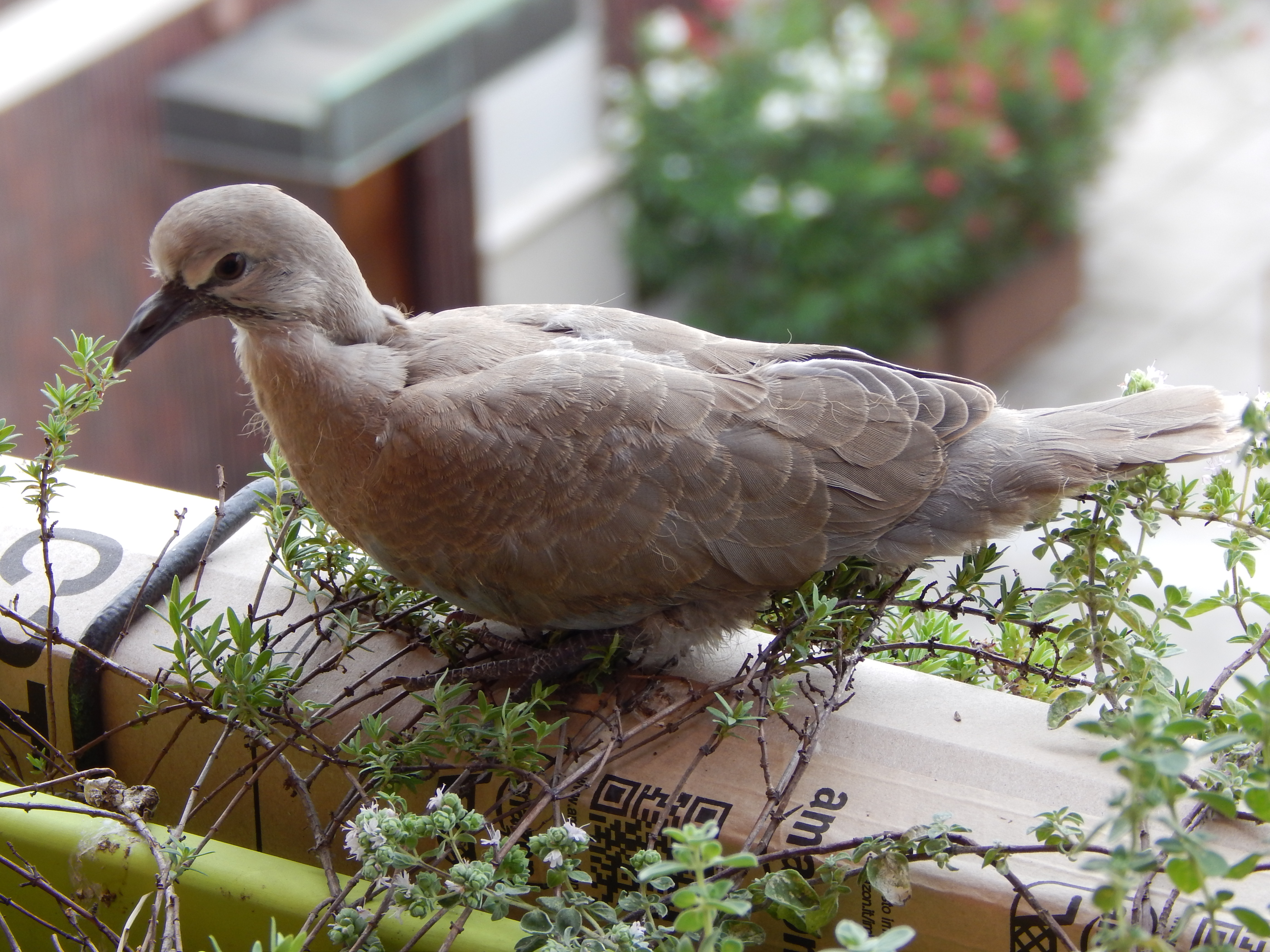 Tortora dal collare (15 giorni di vita)